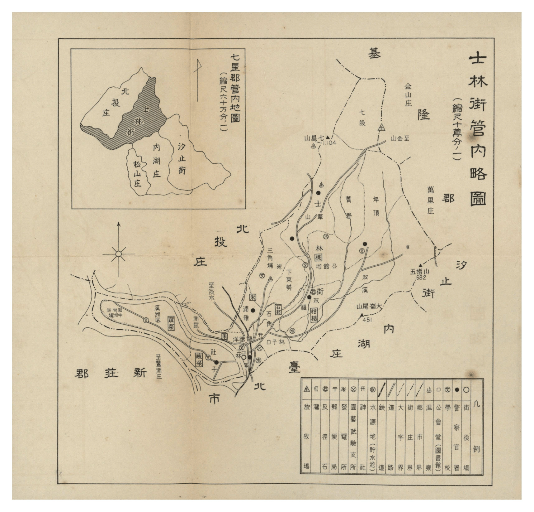 Map of Shirin Town, published in 1936